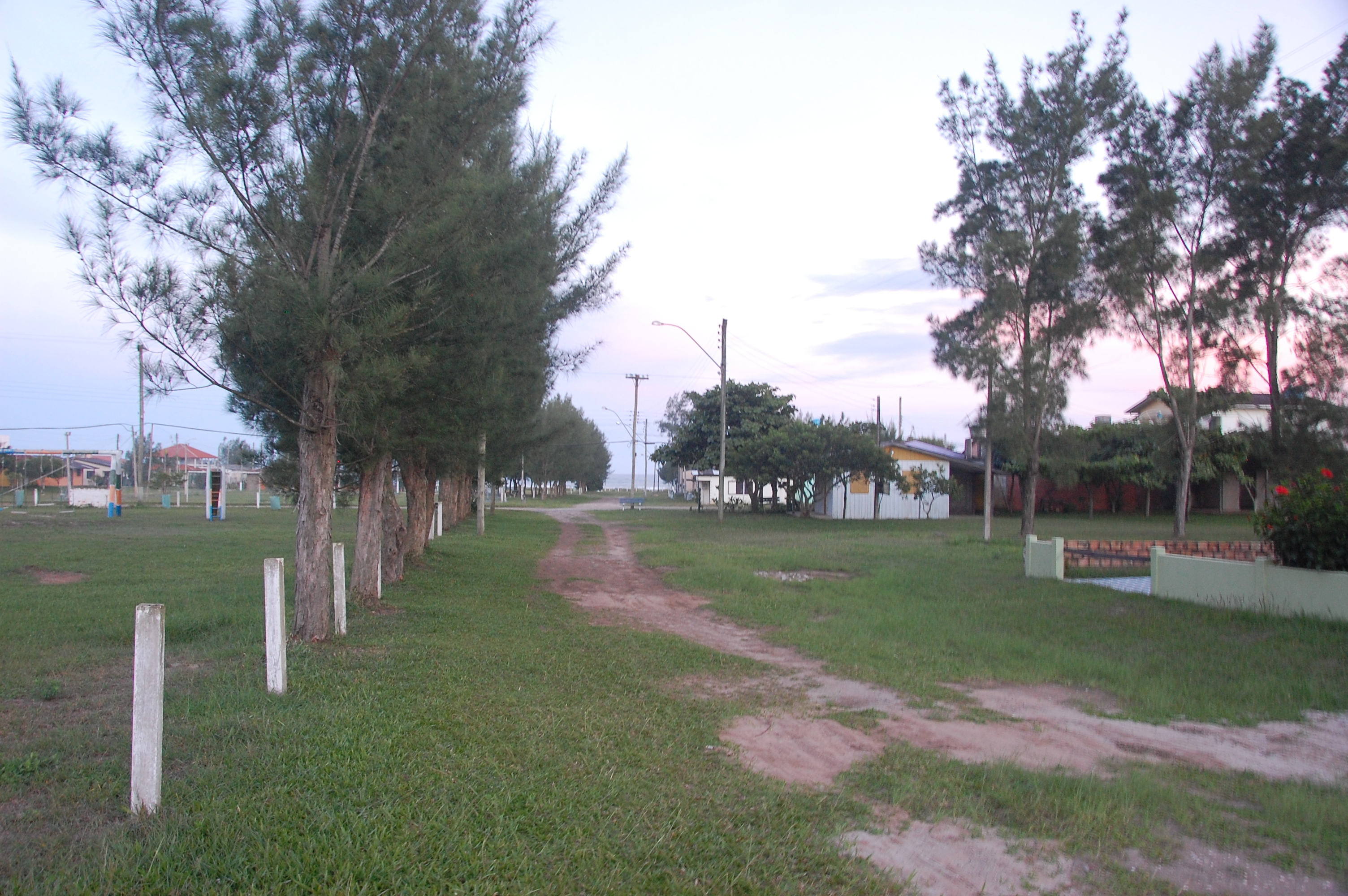 Avenida Sul na Praia Arroio Seco.